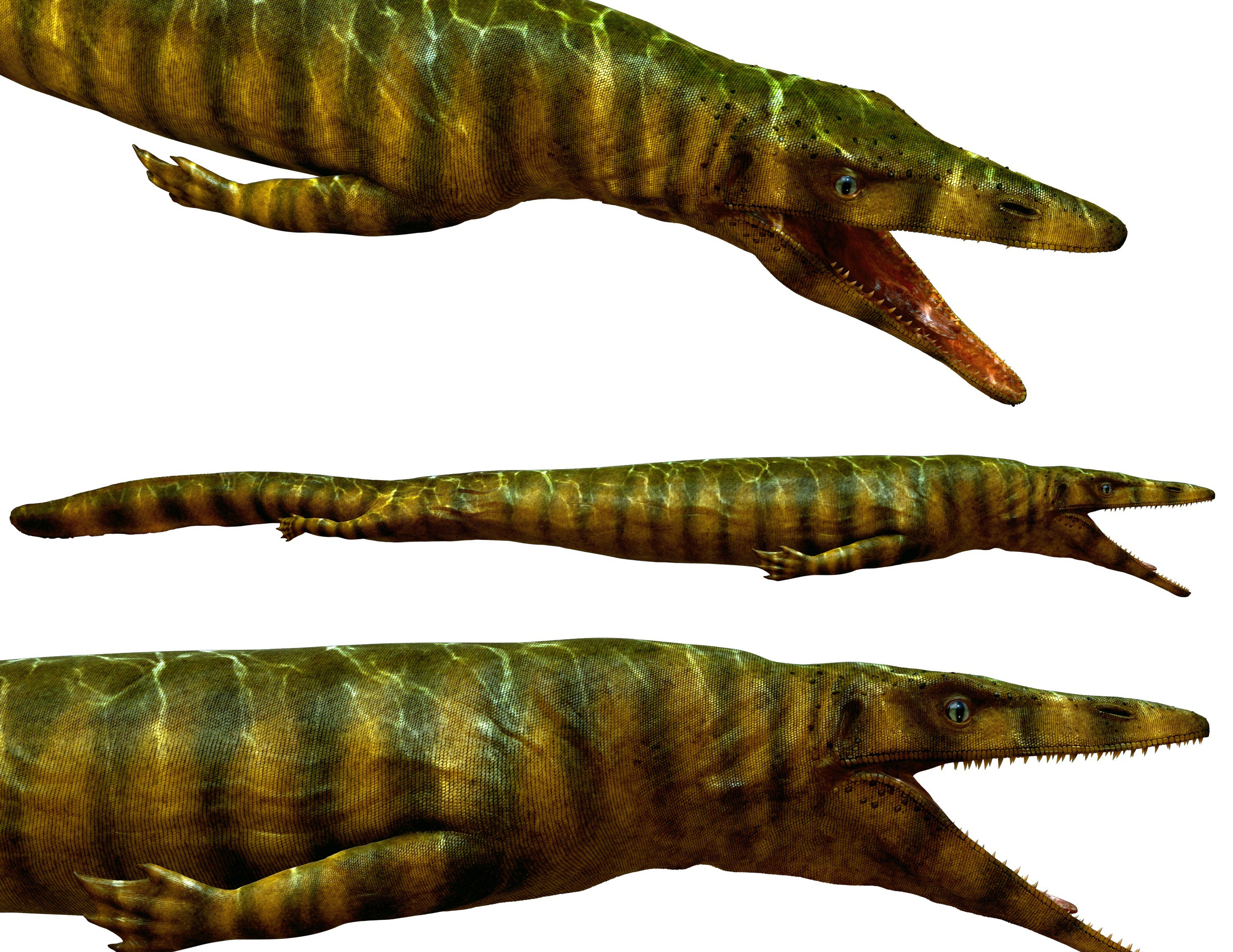 Dallasaurus